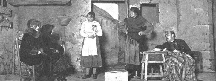 Escena del estreno de la obra de teatro La chica del gato, de Carlos Arniches